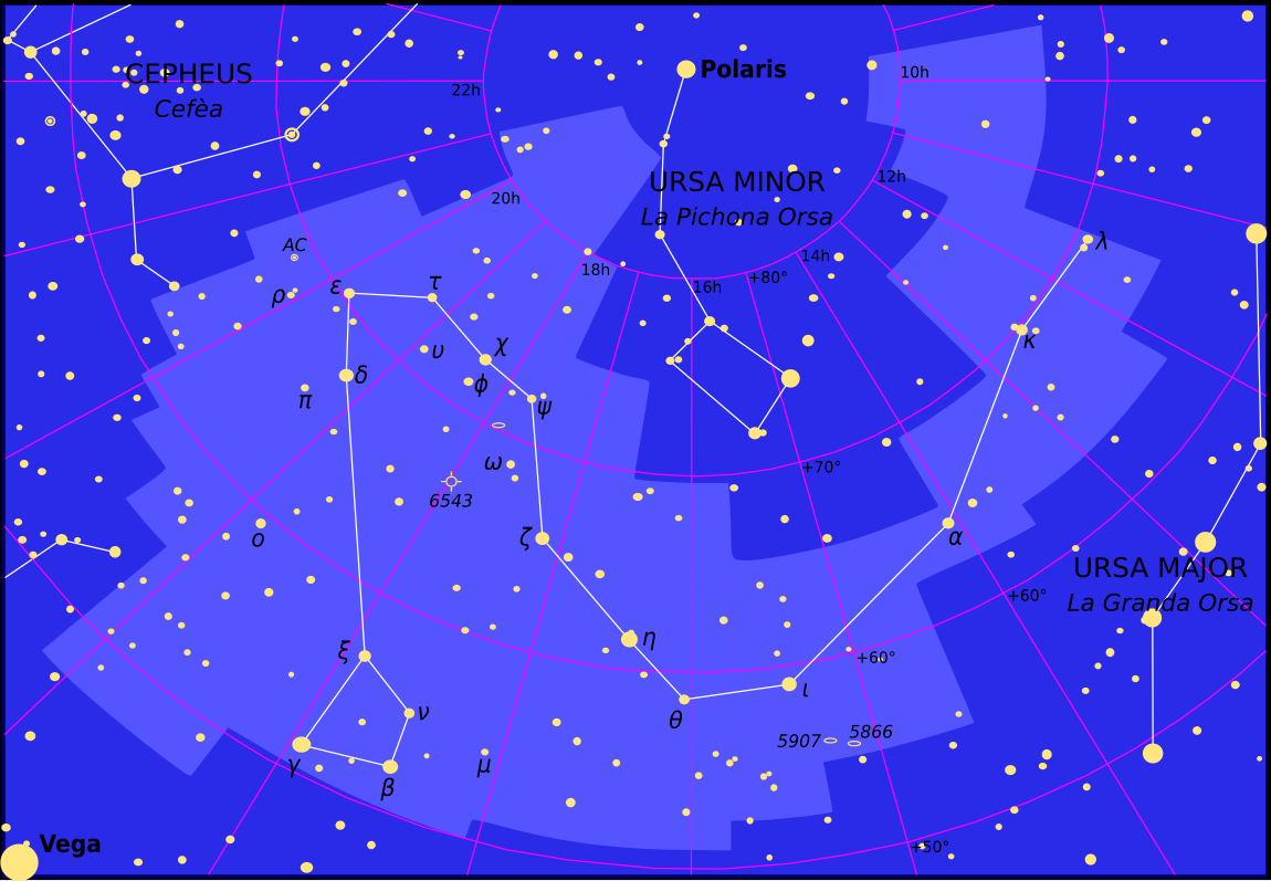 Constellacion dau Drac.